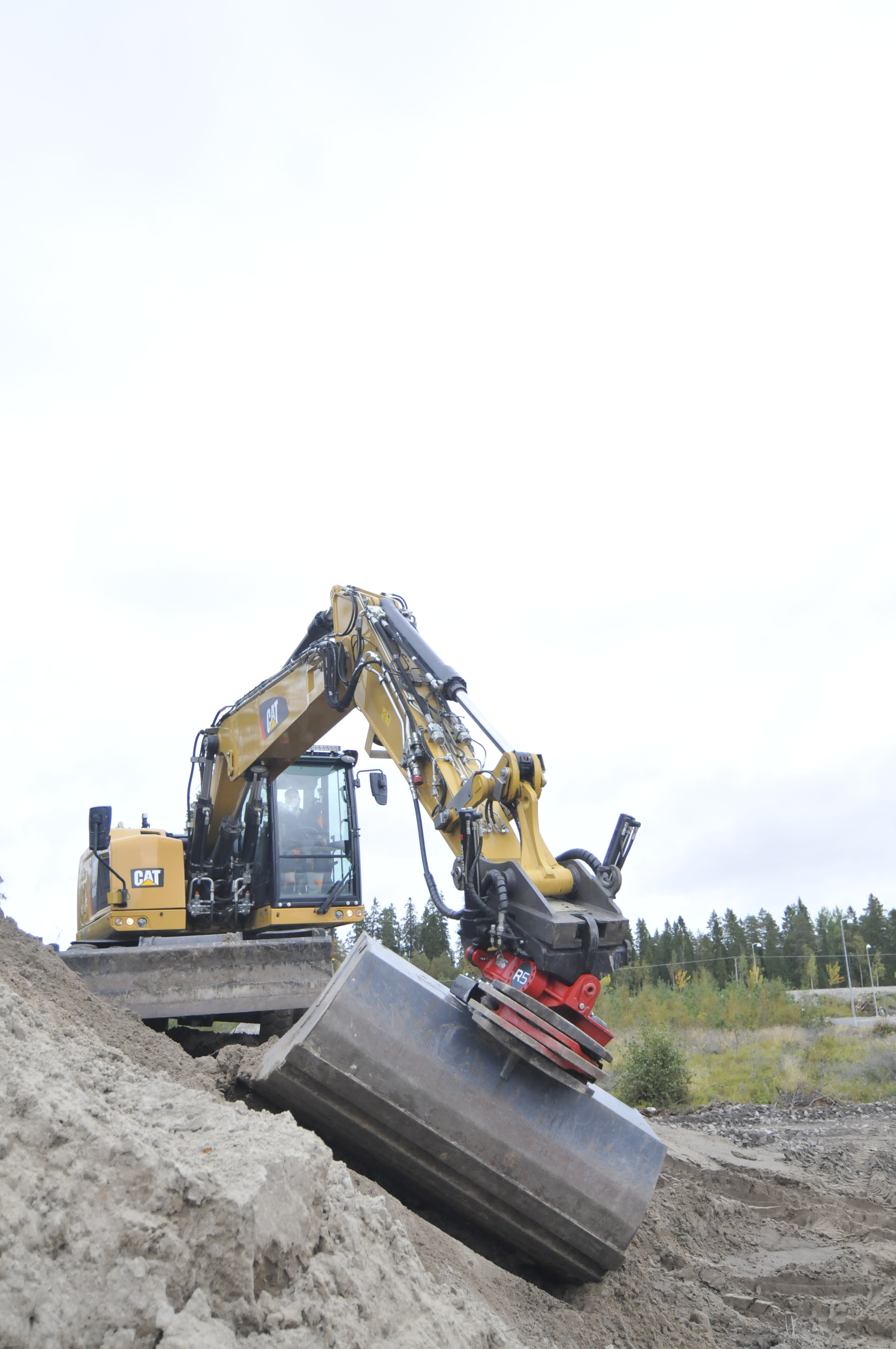 Med tiltrotator effektiviseras arbetet med grävmaskin. Färre maskinförflyttningar och större precision.